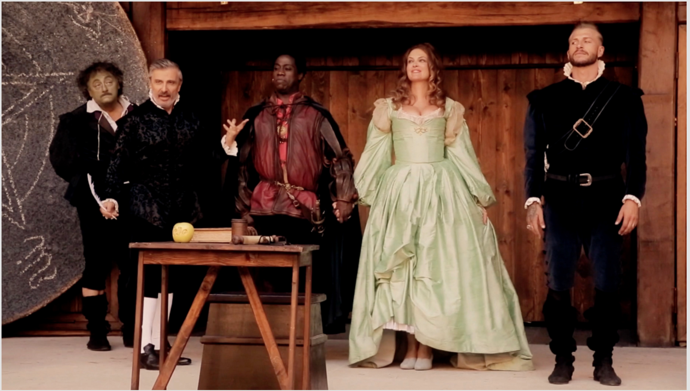 Una foto di scena della compagnia di Othello 3.0